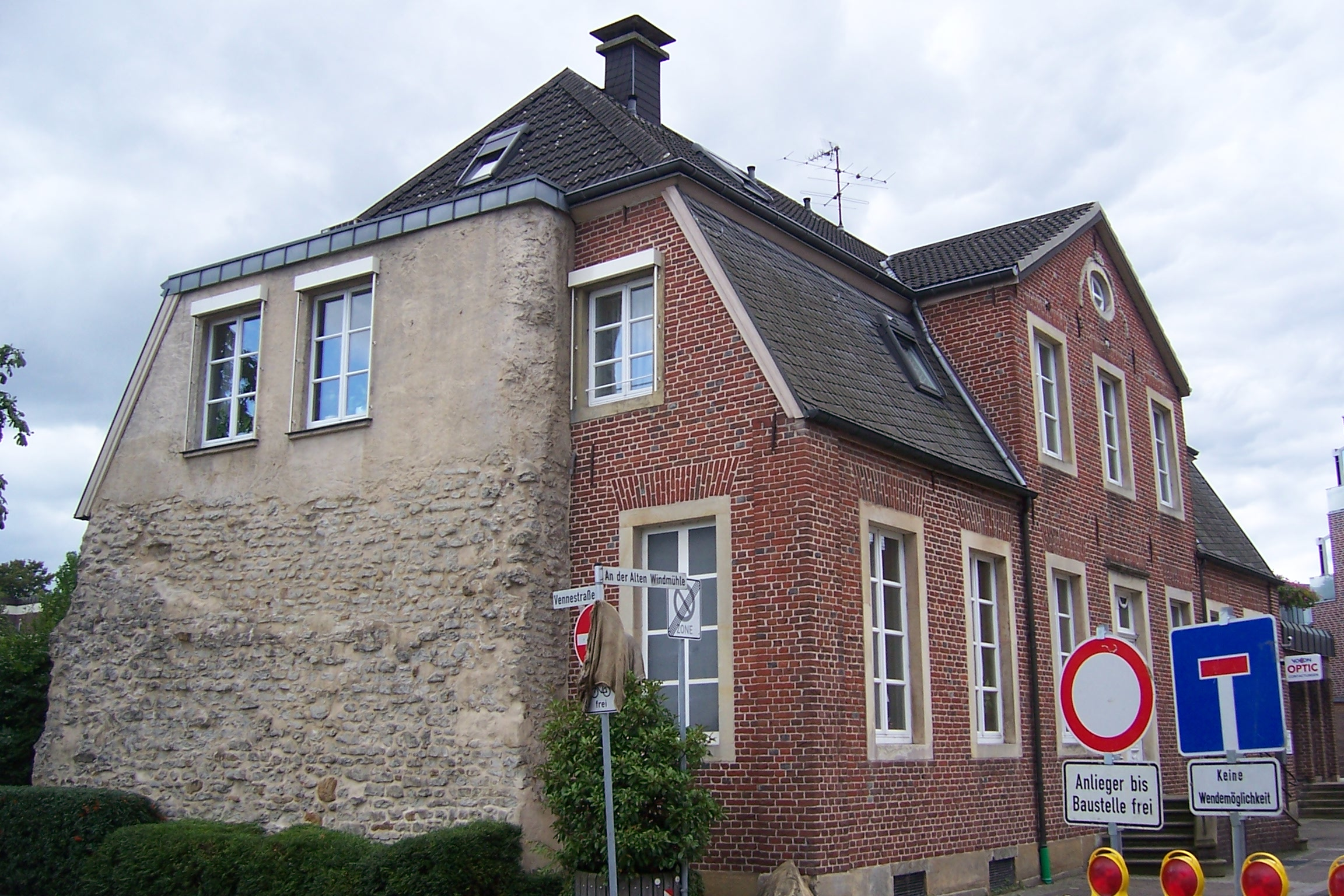 Rest Vennetor Anfang 19. Jhdt abgebrochen. Integrierte Reste an Haus von 1803 (An der alten Windmühle 3) Borken NRW Germany